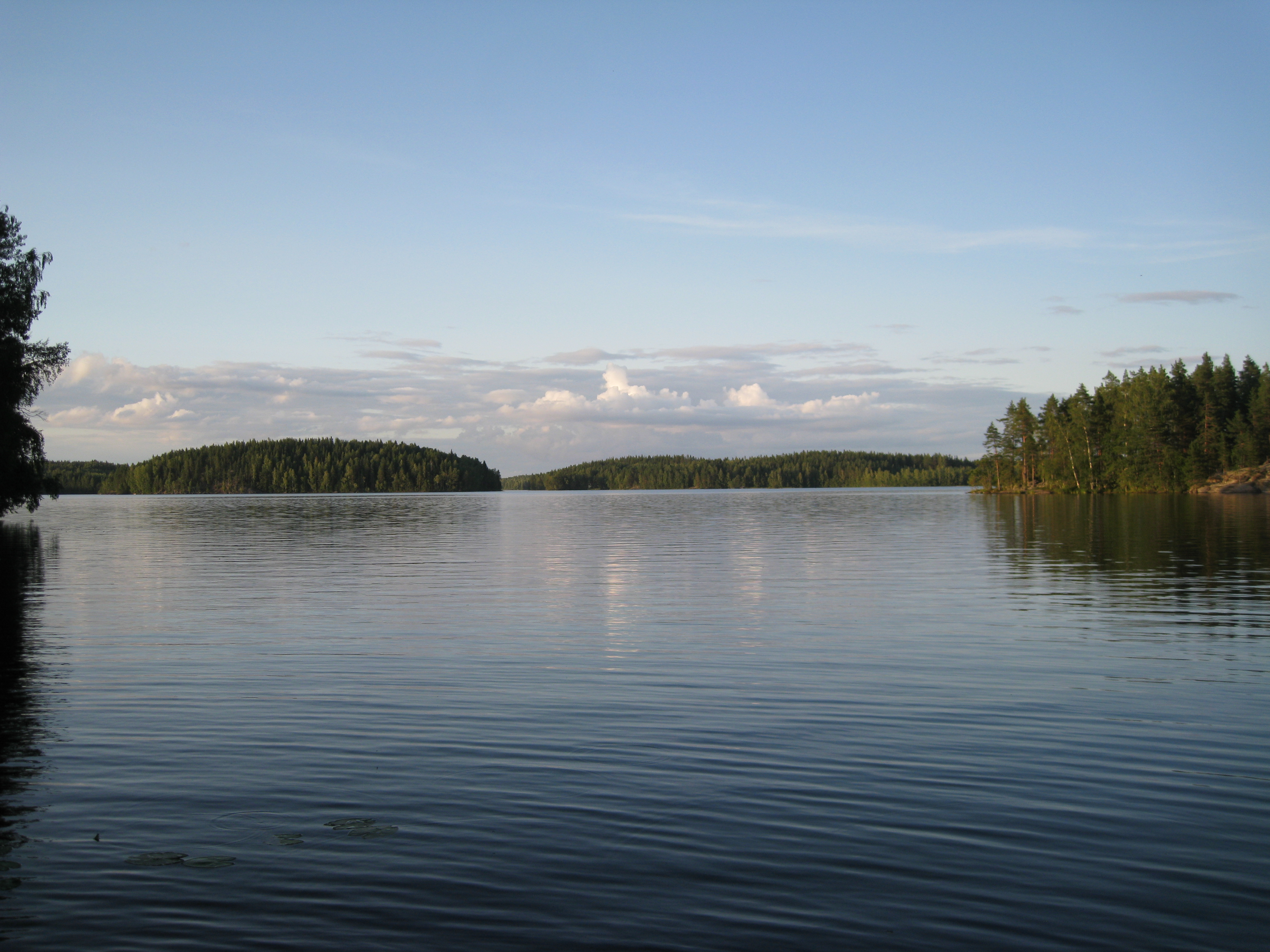 Järvimaisema